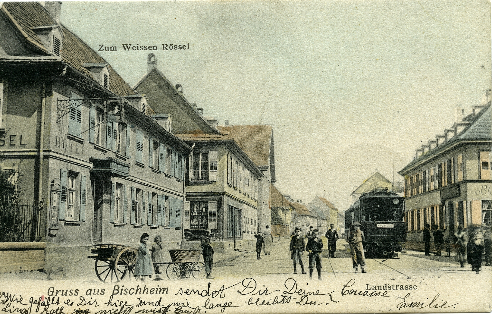 L'auberge du Cheval Blanc, route de Bischwiller à Bischheim - Collection Ville de Bischheim